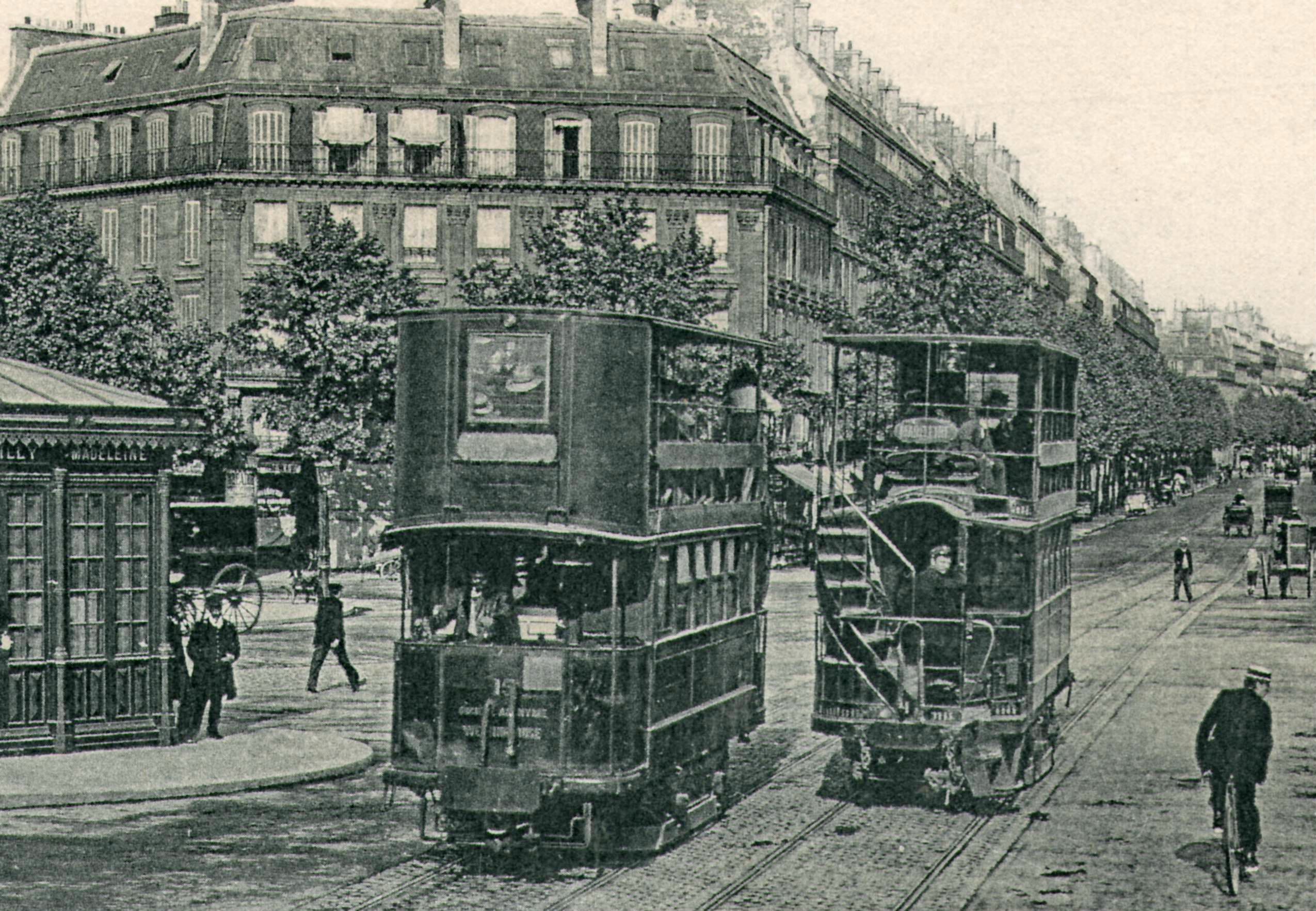 Détail de la carte postale ancienne éditée par ND Phot. à Paris, n°559PARIS - La Place Péreire et l'Avenue de VilliersMotrice électrique à accumulateurs système Heilmann, construite en 1897 à 35 ex. pour la TPDS